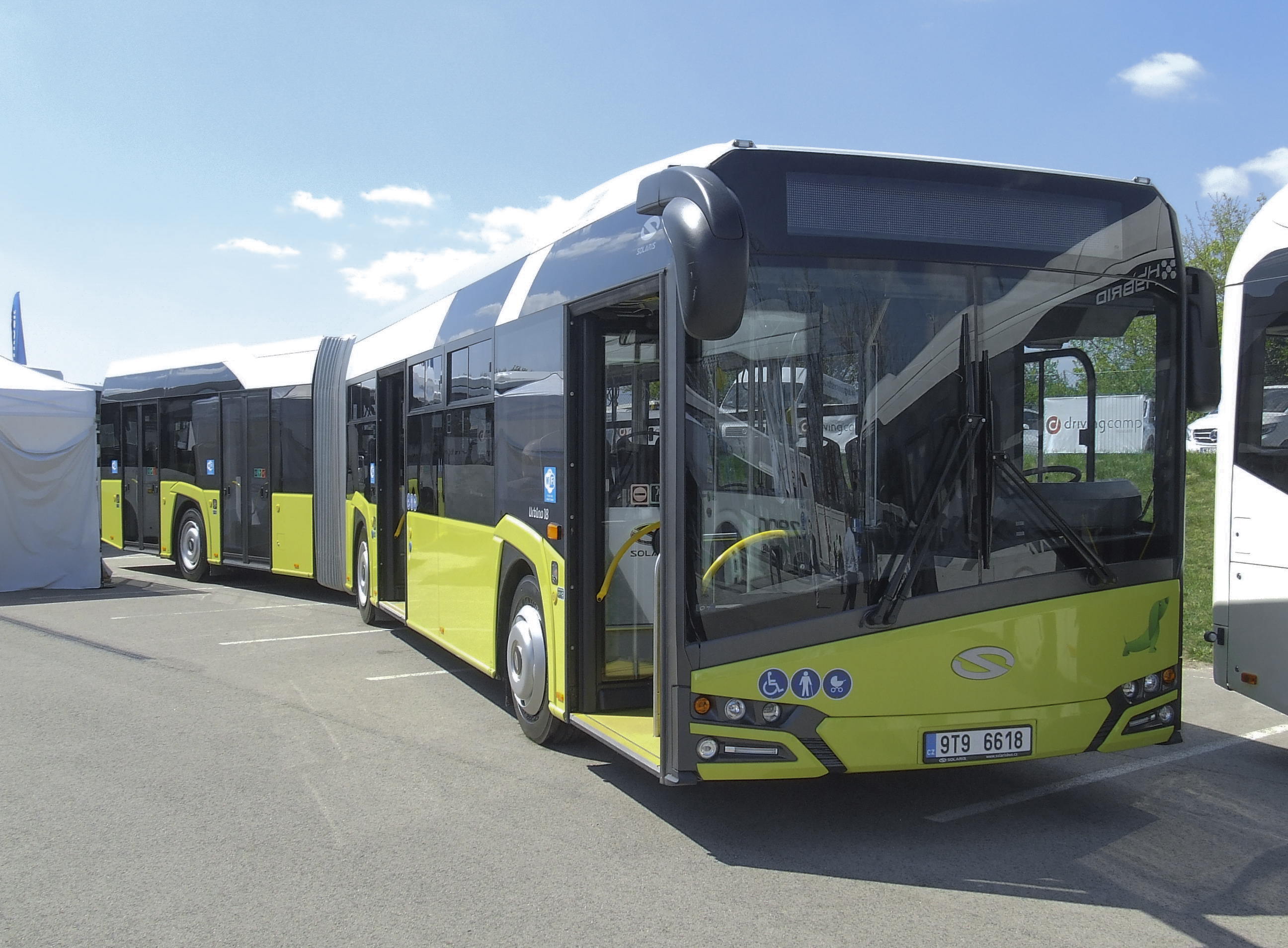 Busexpo 2016, Zsámbék